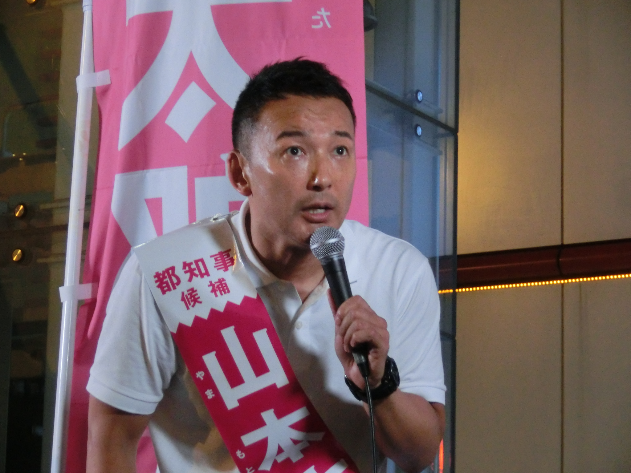 6/27(土) 北千住駅西口デッキでの街頭演説